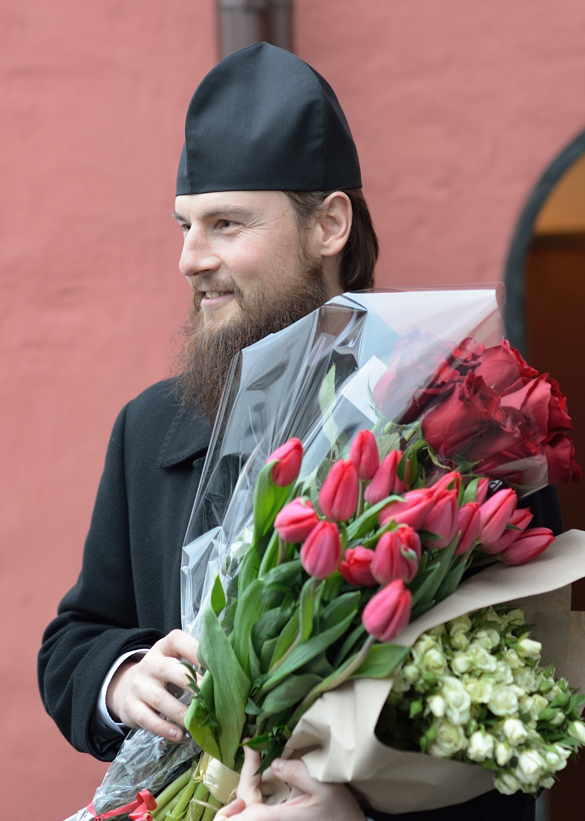 Игумен Петр в день рождения 02_12_2015г